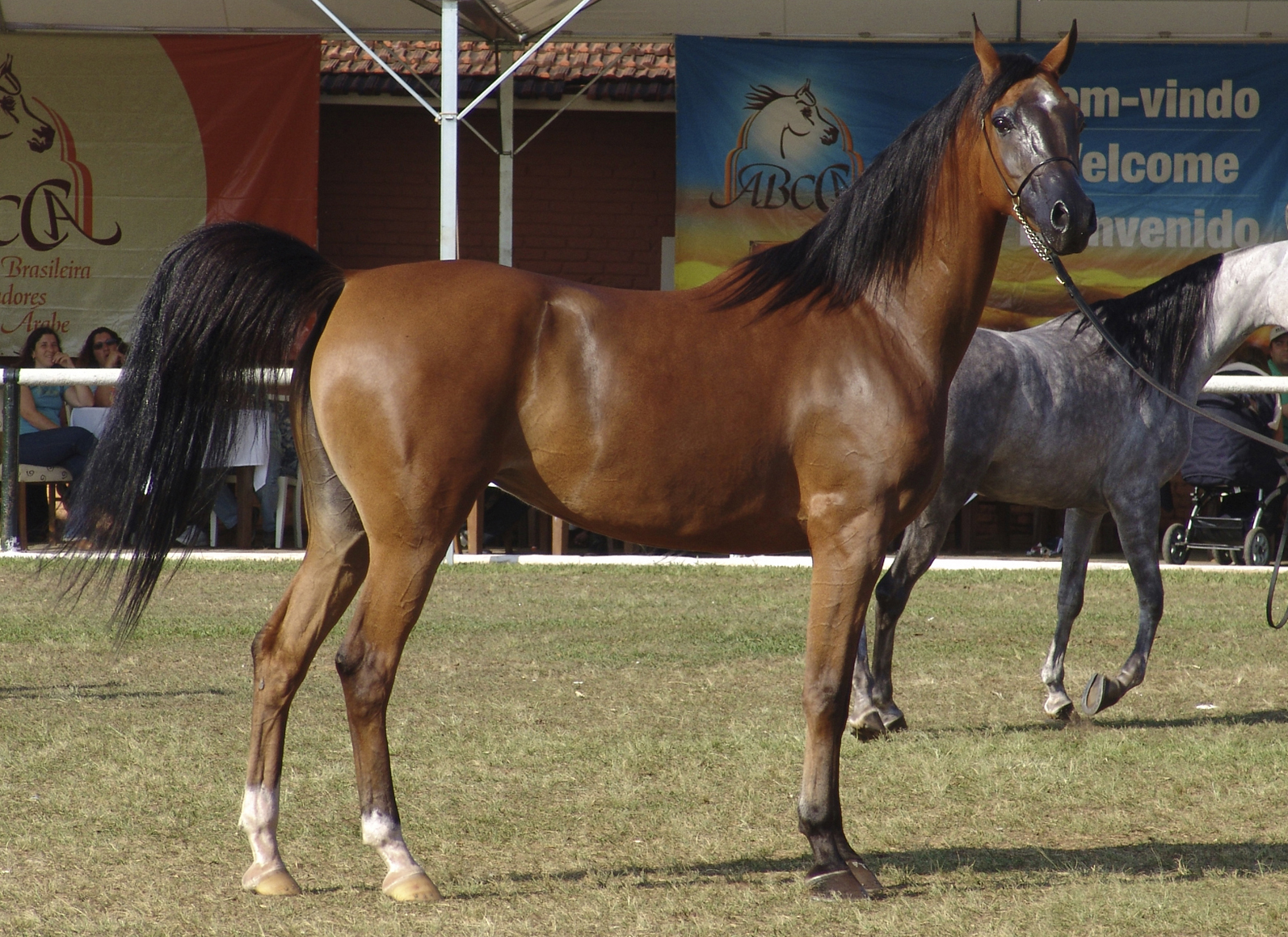 Cavalo da raça árabe em exposição na EMAPA,Avaré, Brasil